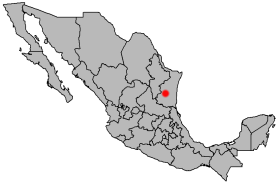 Locator map of Ciudad Victoria, Tamaulipas, Mexico